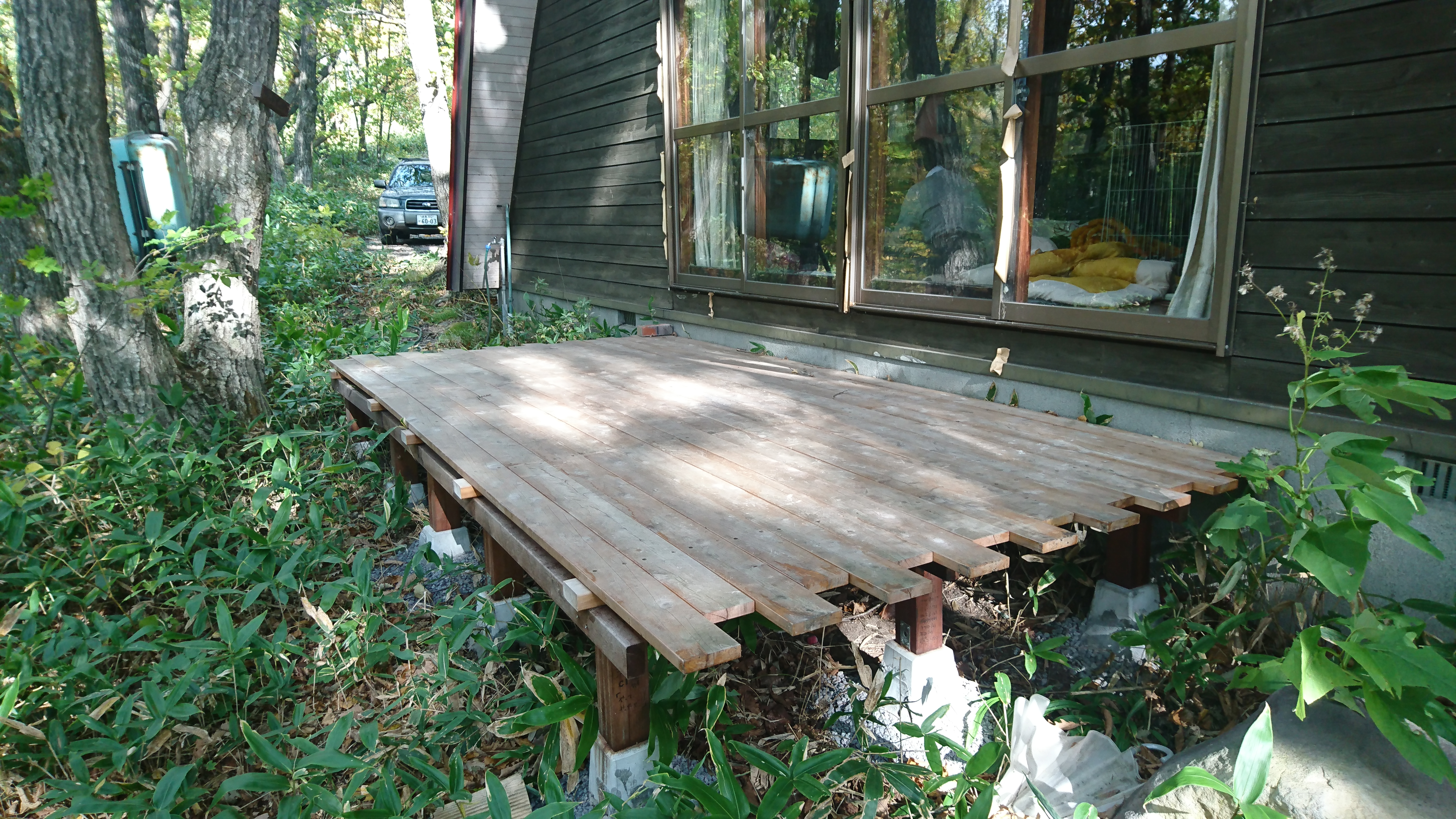 士幌小屋チセ・フレップに設けられたウッドデッキ